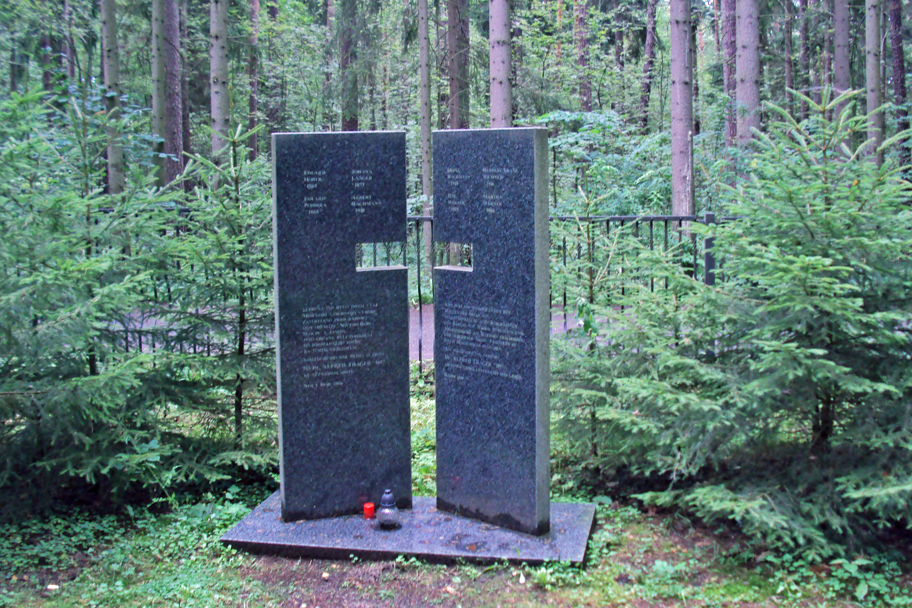 Nový pomník zastřelených Němců Čechy v roce 1945